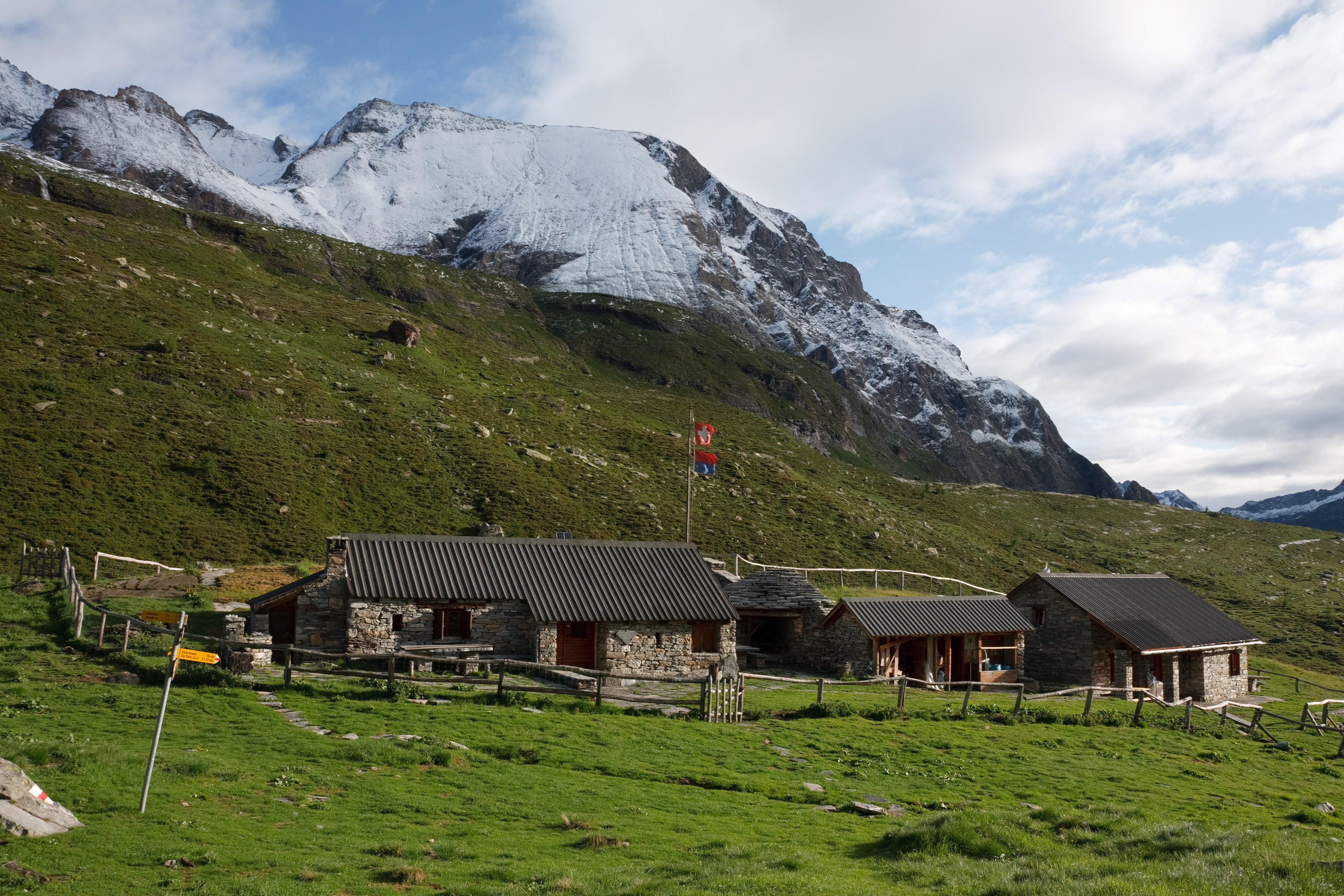 Die Hütte Piano delle Creste